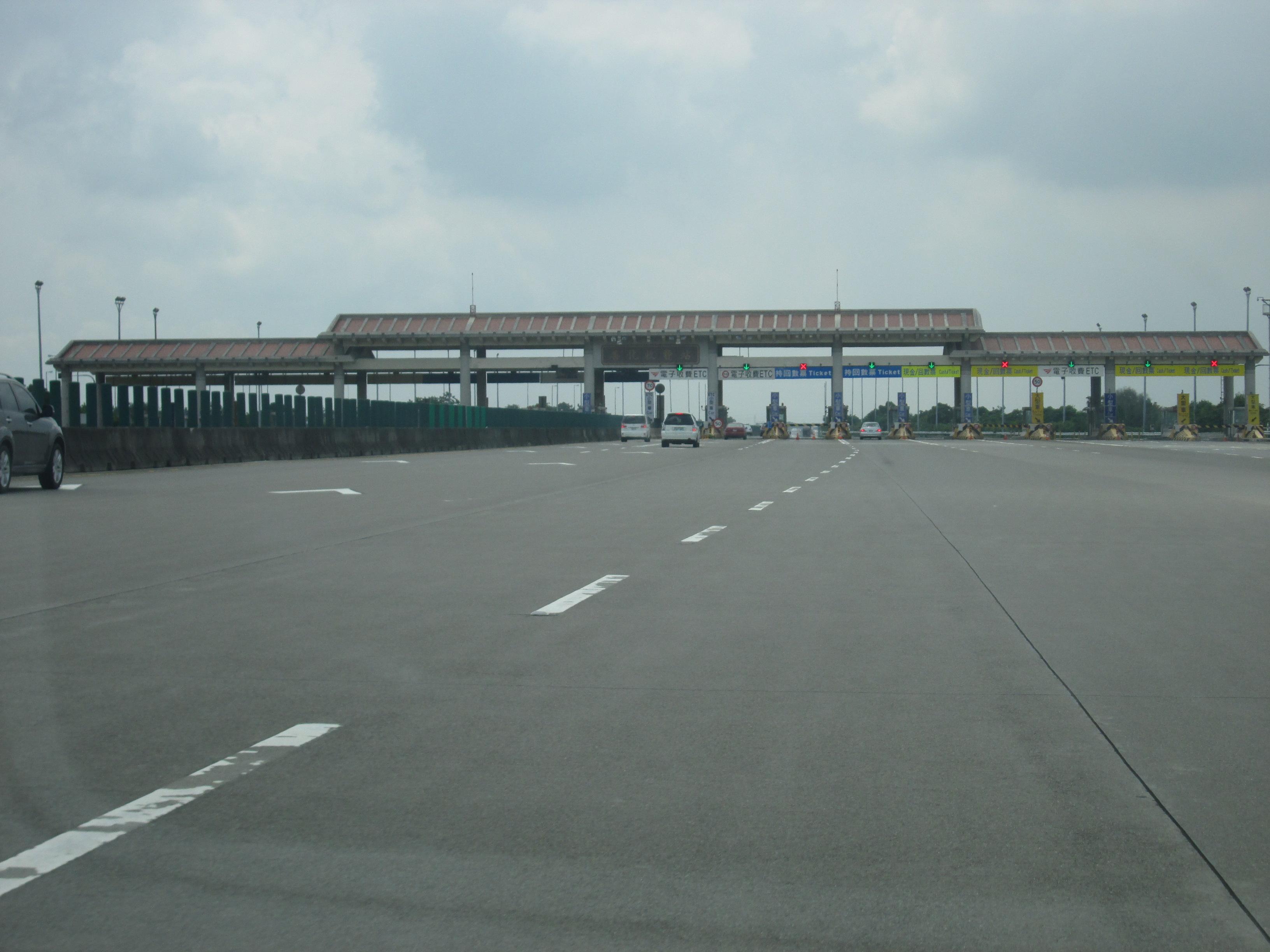 福爾摩沙高速公路 善化收費站